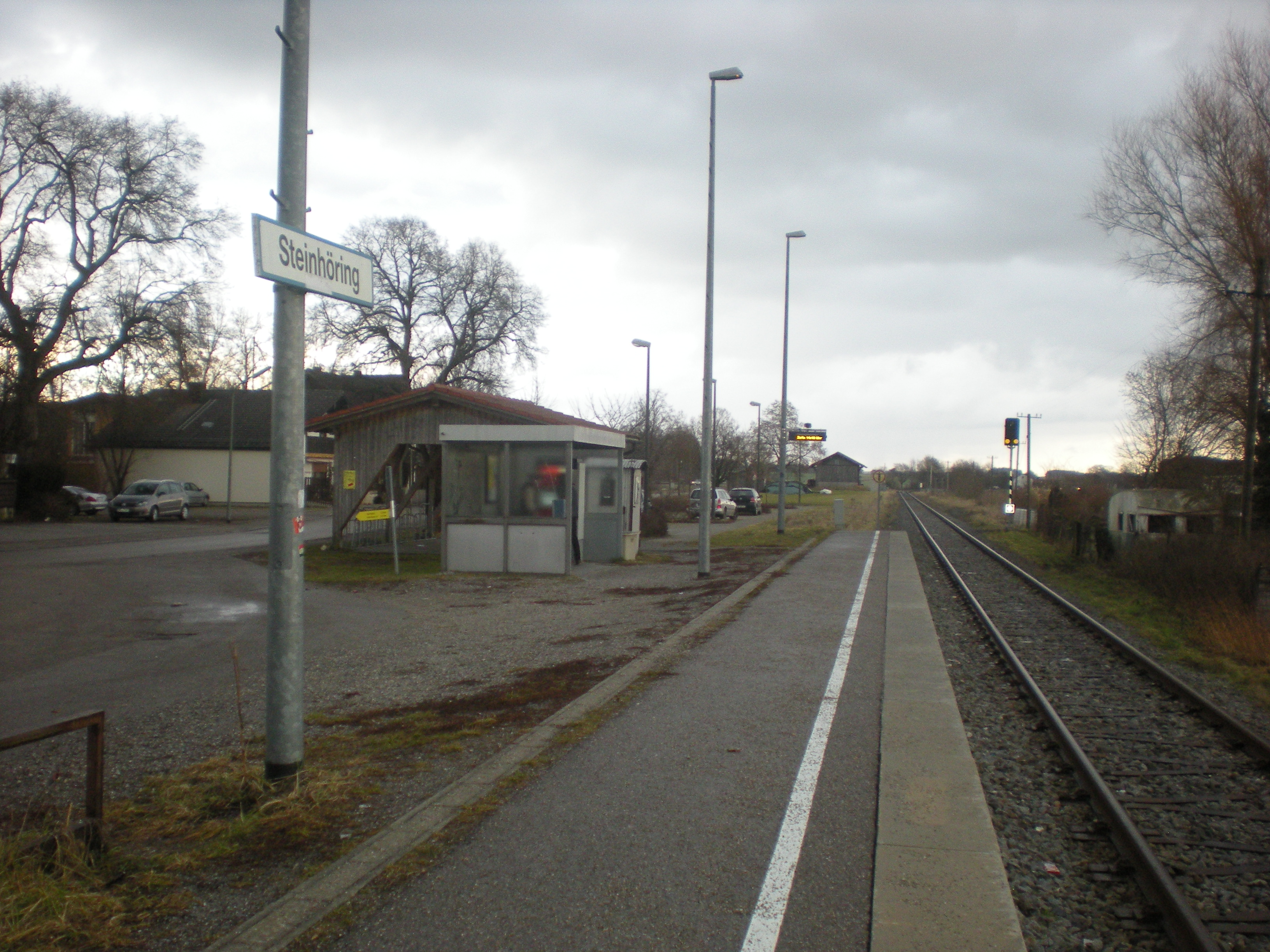 Seitenbahnsteig des Haltepunkts Steinhöring - vor dem Ausbau zum Kreuzungsbahnhof